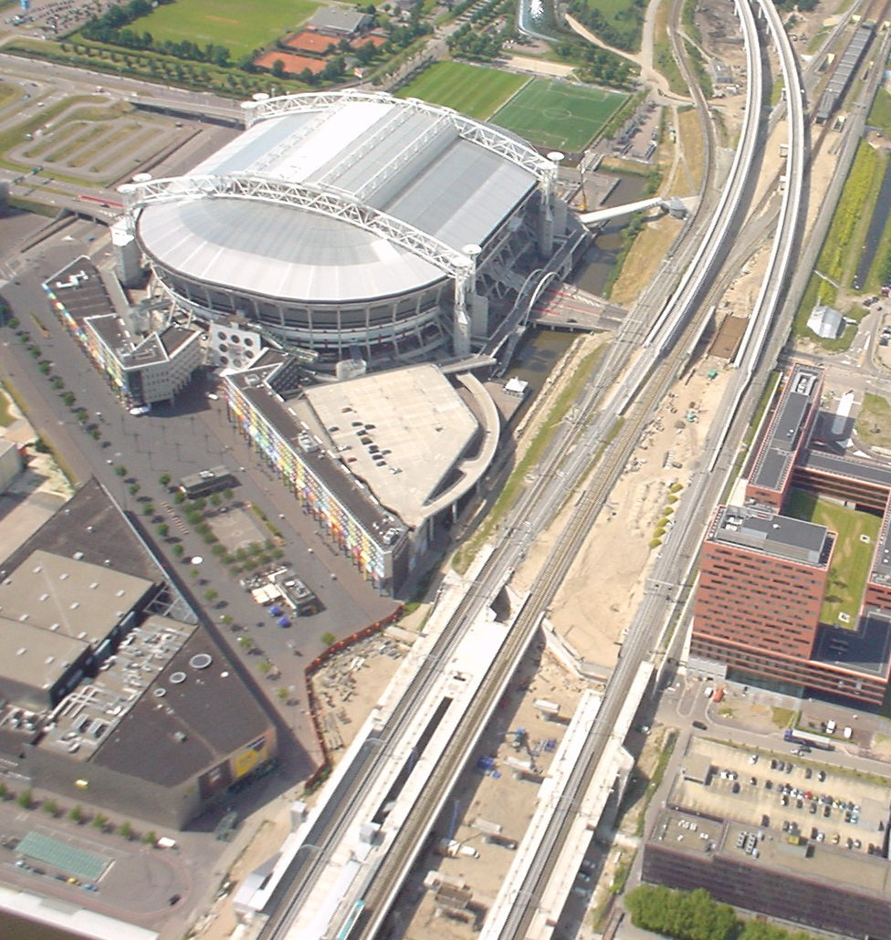 Amsterdam Arena aerial picture